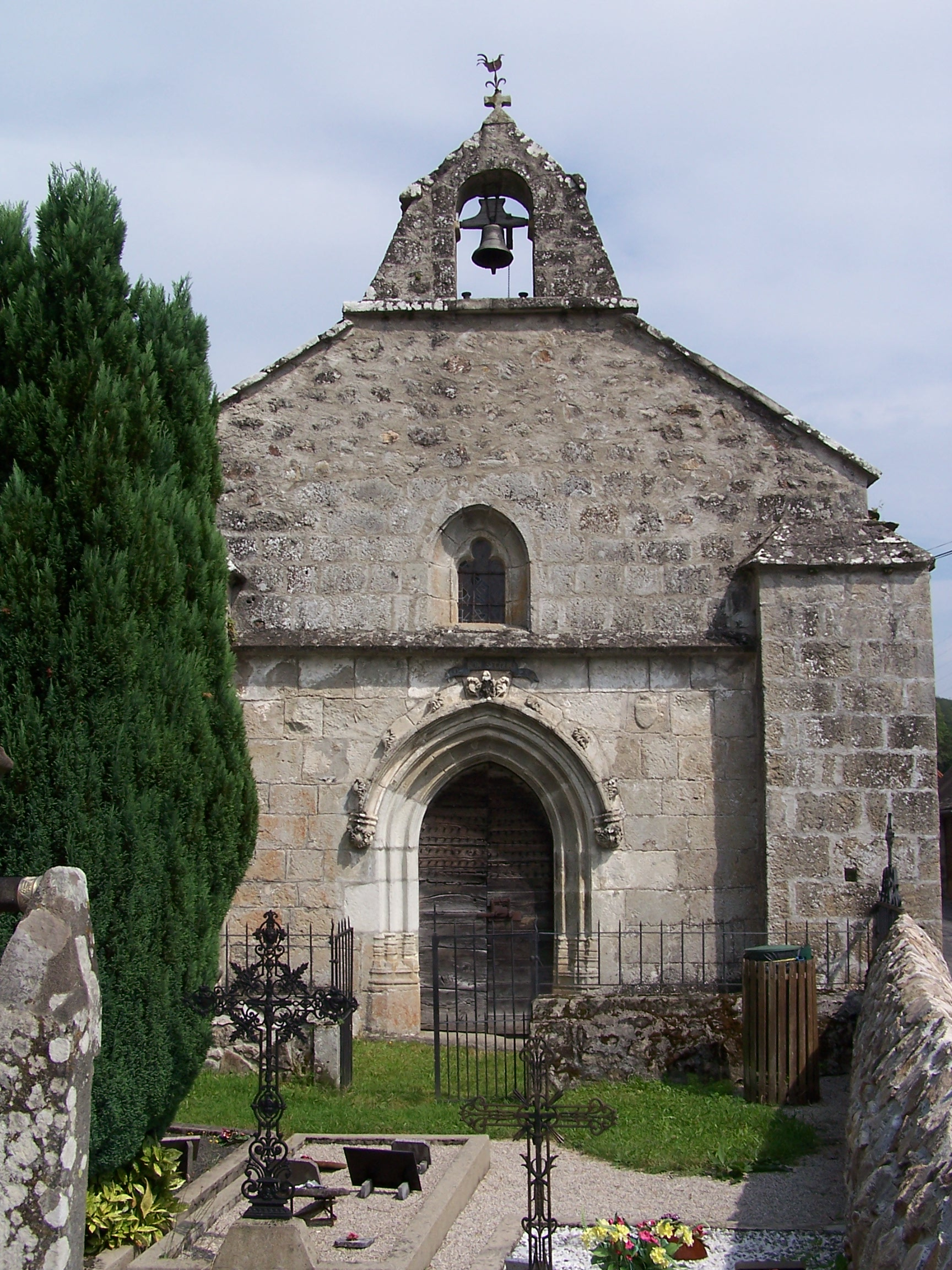 La chapelle Saint-Ferréol et Notre-Dame du Bon-secours à Salsignac (commune d'Antignac, Cantal)